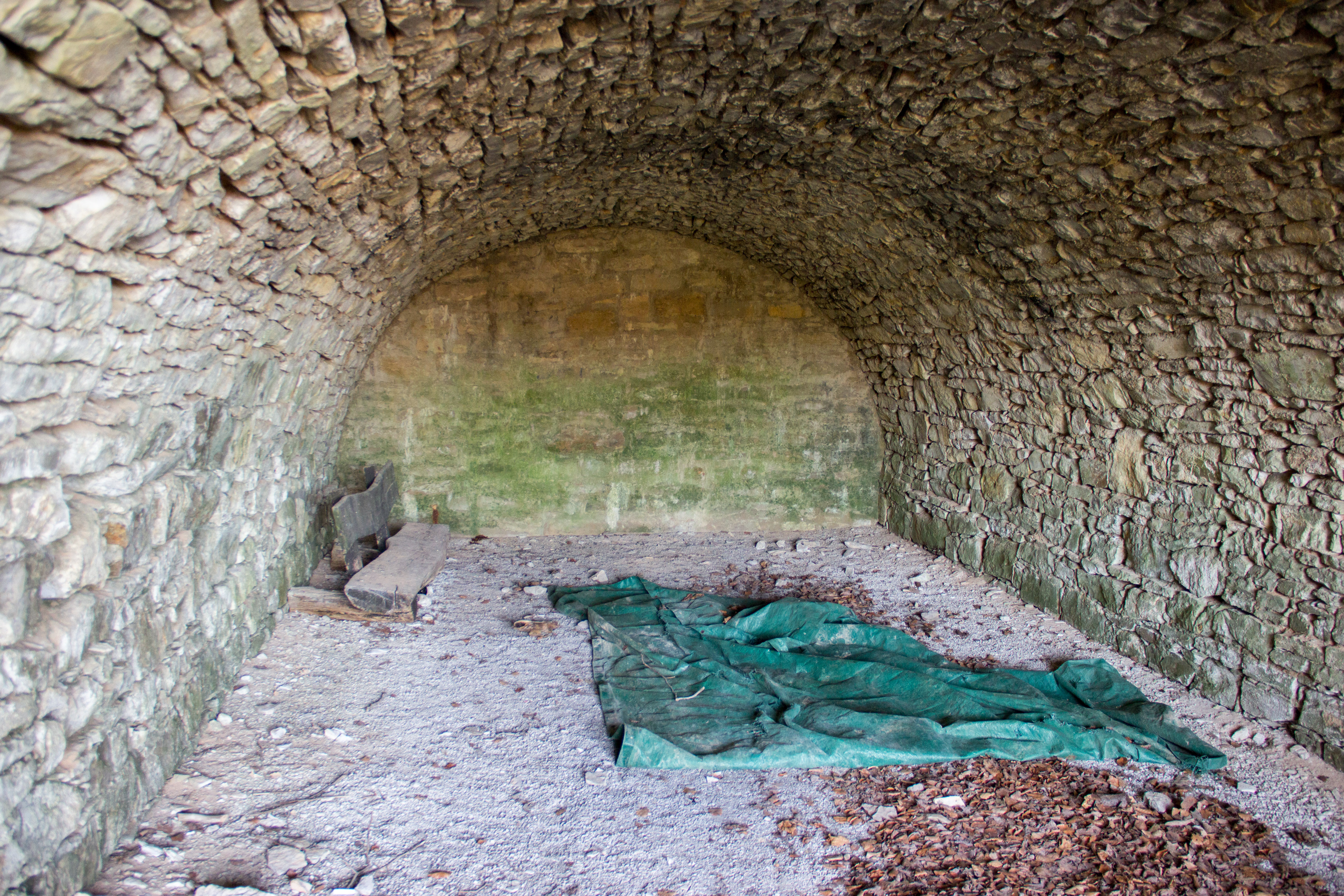 Hechlingen, Katharinenkapelle, Bierkeller